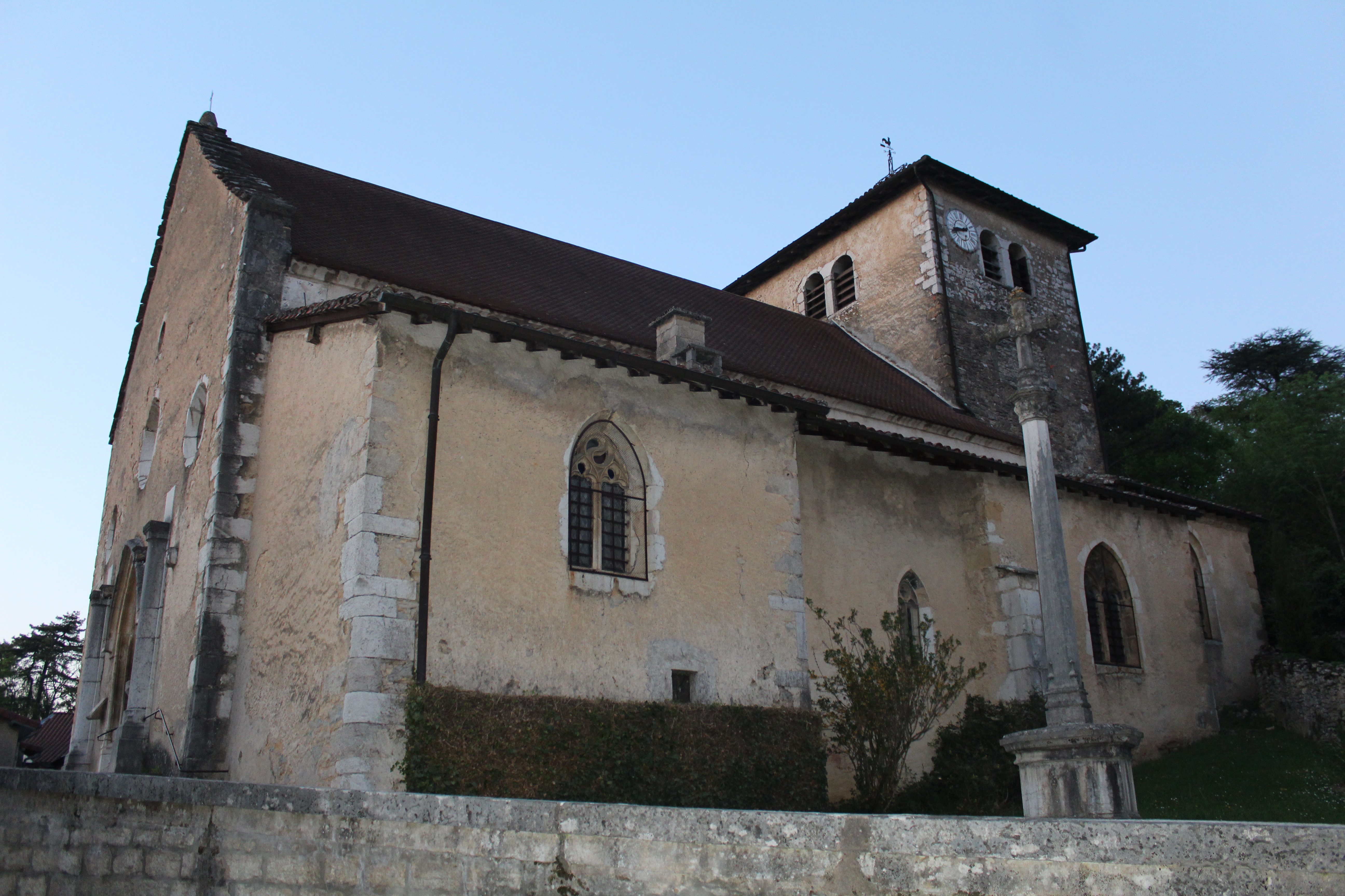 Église Saint-Jean-Baptiste de Jasseron.